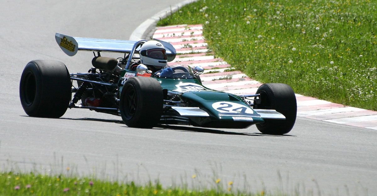 Lotus 69 at the Salzburgring, Salzburg, Austria. Gaisbergrennen 2005